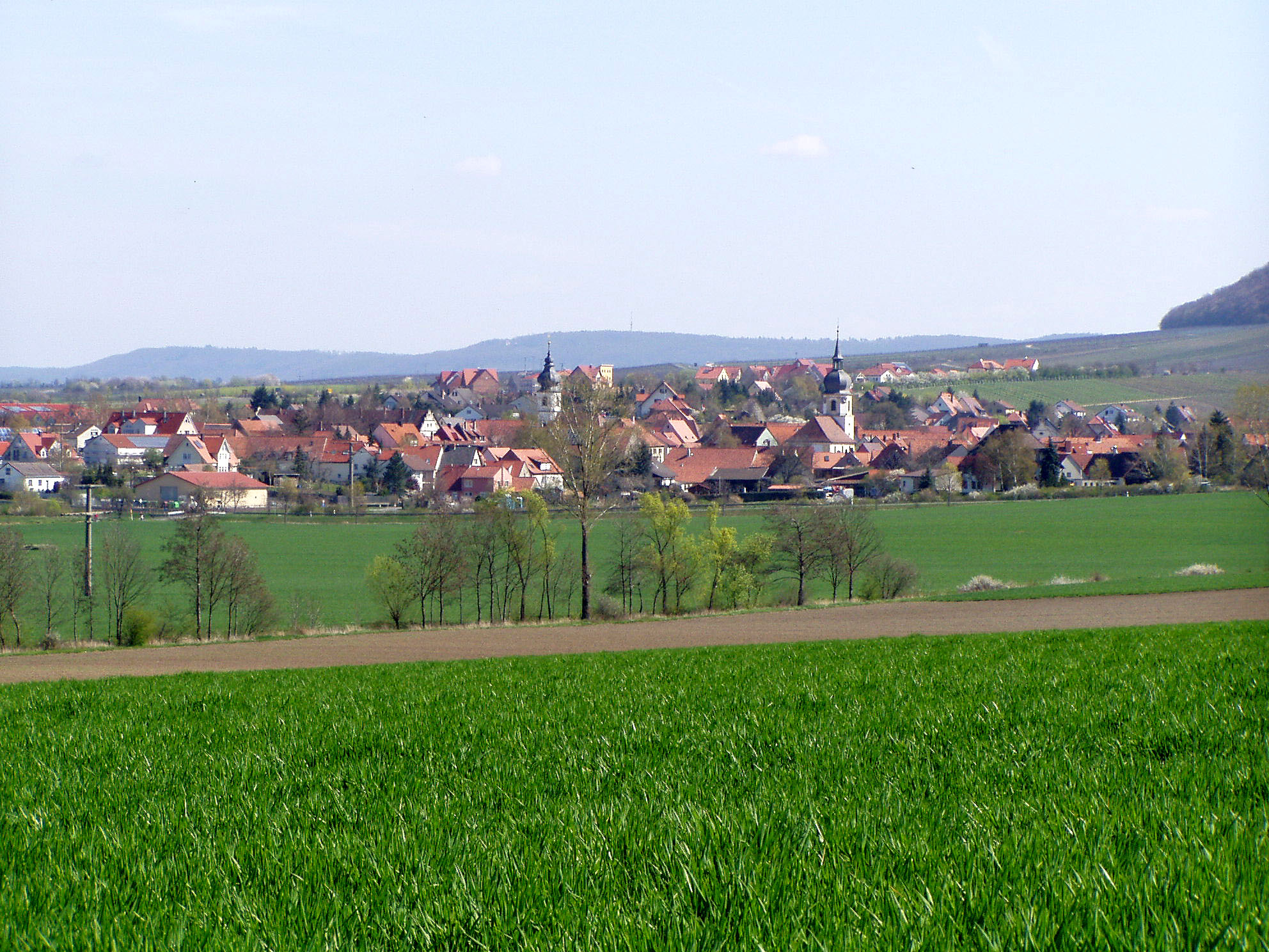 Rödelsee am Fuße des Schwanbergs